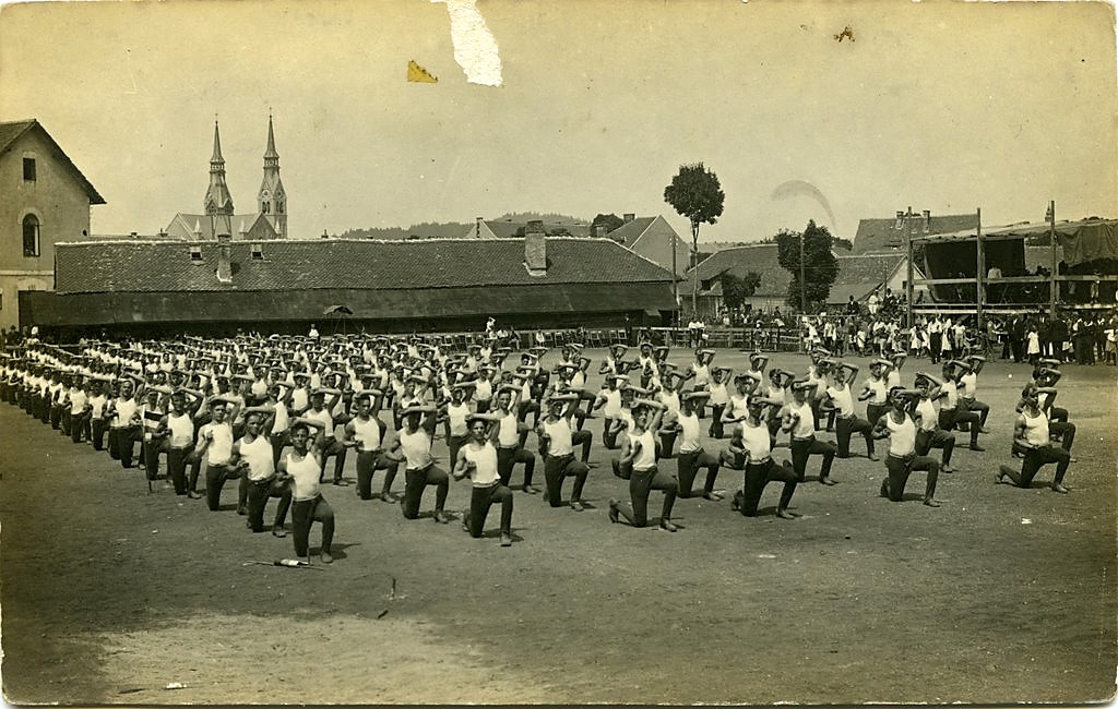 Nastop cerkniških sokolov v Trnovem.